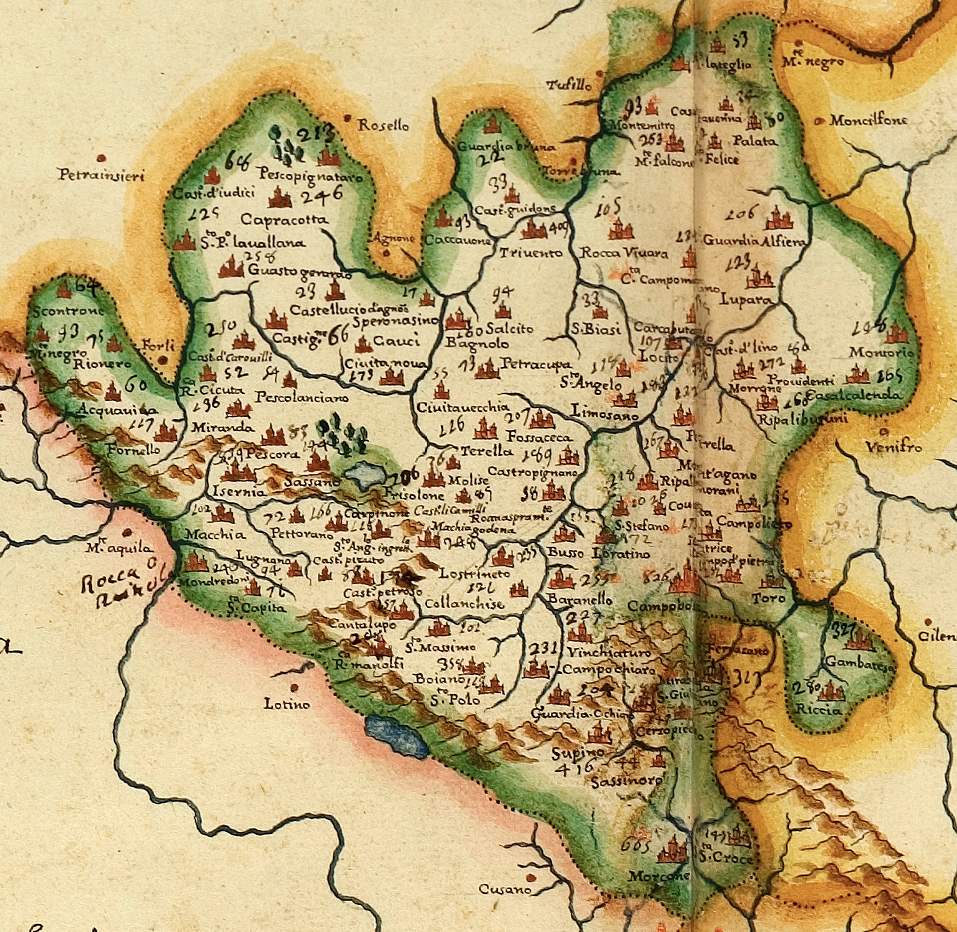 Disegno del Contado di Molise (mappa in: Mario Cartaro (Viterbo 1540-1620?) e Nicola Antonio Stigliola (Nola, 1546-1623), Il Regno di Napoli Ms. cart., sec. XVII (1613), 13 cc. Fondo/Raccolta: Sezione Manoscritti e Rari. Collocazione: Ms. XII D 100